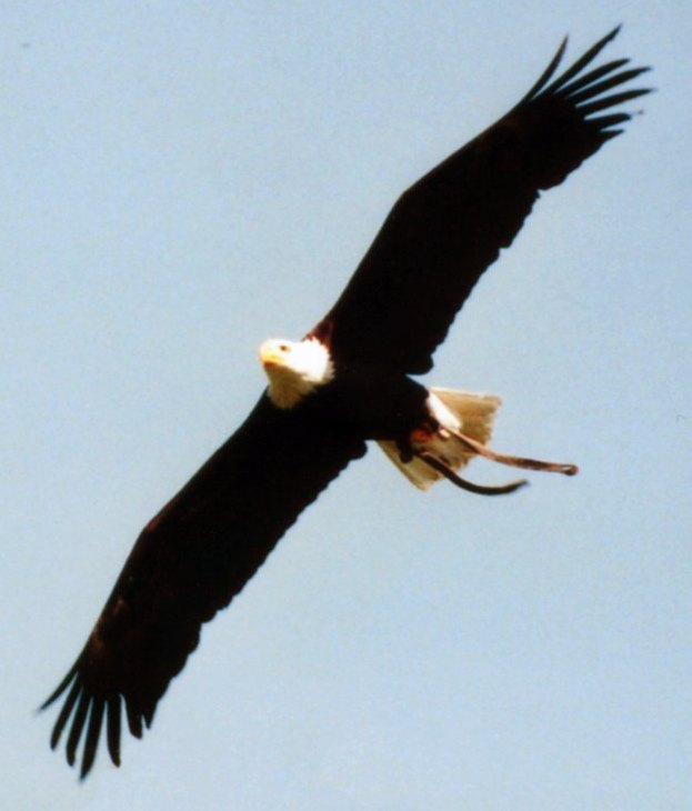 Weißkopfseeadler (Haliaeetus leucocephalus) im Wildpark Poing